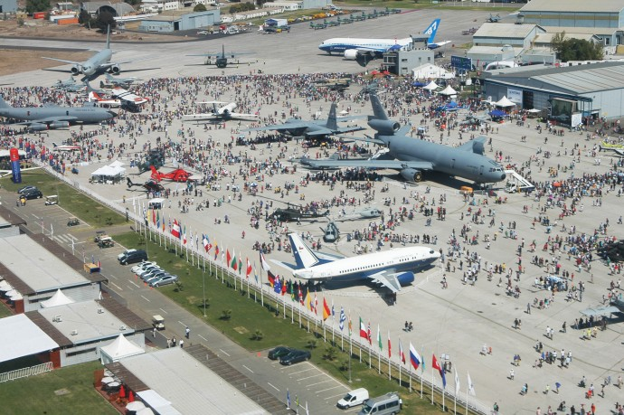 Inauguración FIDAE 2014, Santiago de Chile.